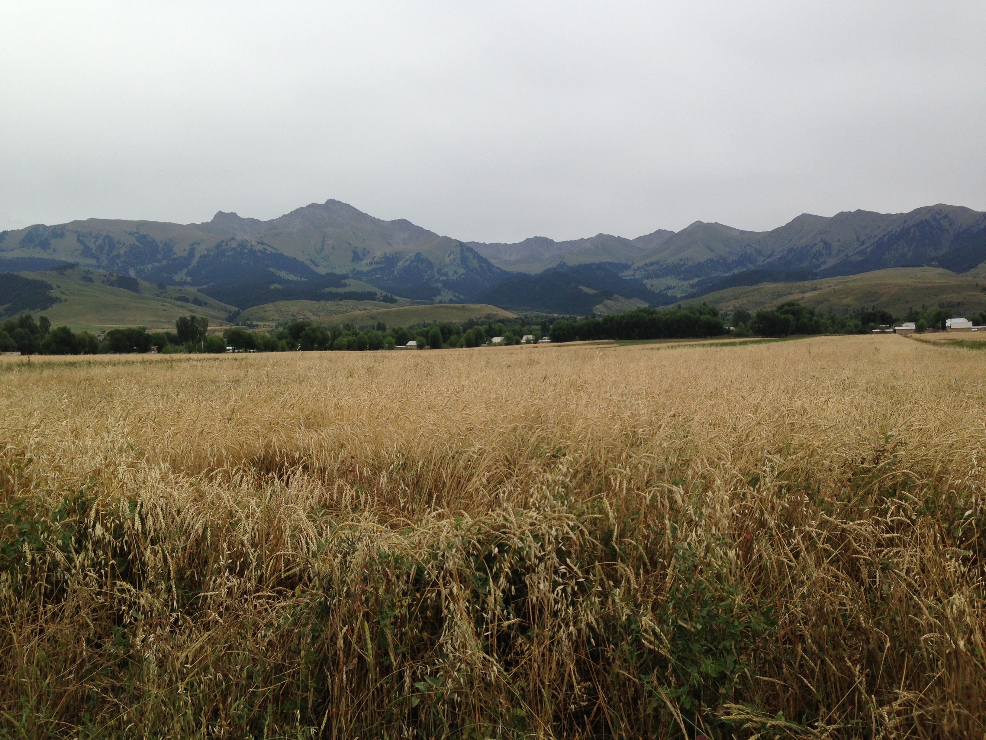 На переднем плане - горы, у подножья которых расположено село Очке - Джергез